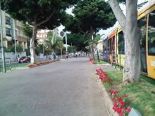 Av. Los Principes (con el tramvía)